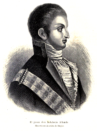 Imagen extraida del libro de Vicente Riva Palacio, Julio Zárate (1880) "México a través de los siglos" Tomo III: "La guerra de independencia" (1808 - 1821)